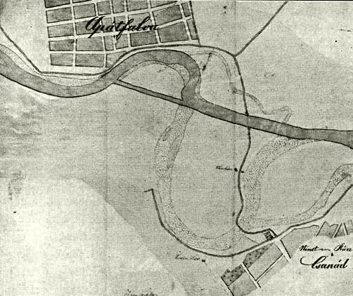 terv